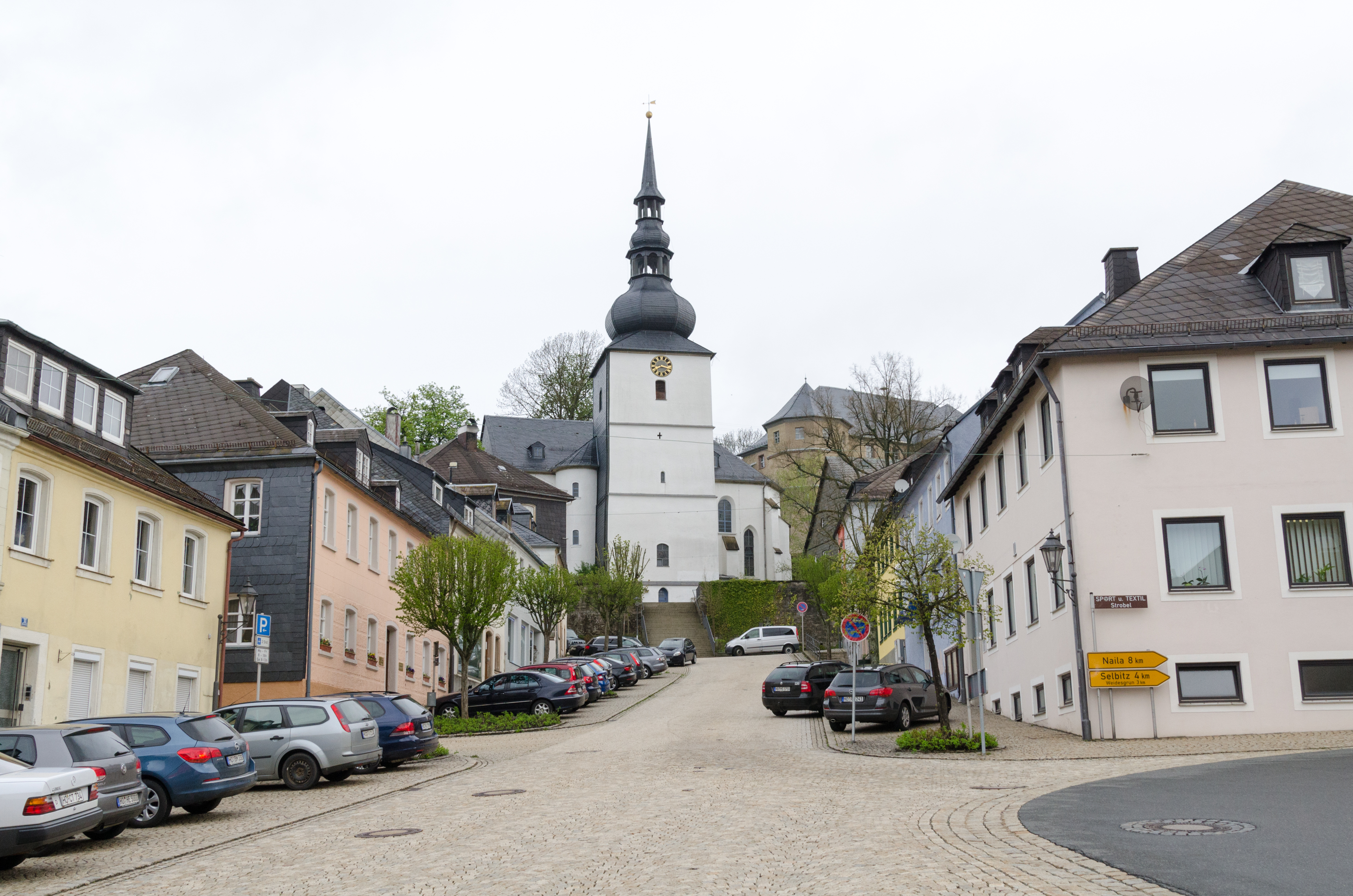 Schauenstein, Ensemble Marktplatz